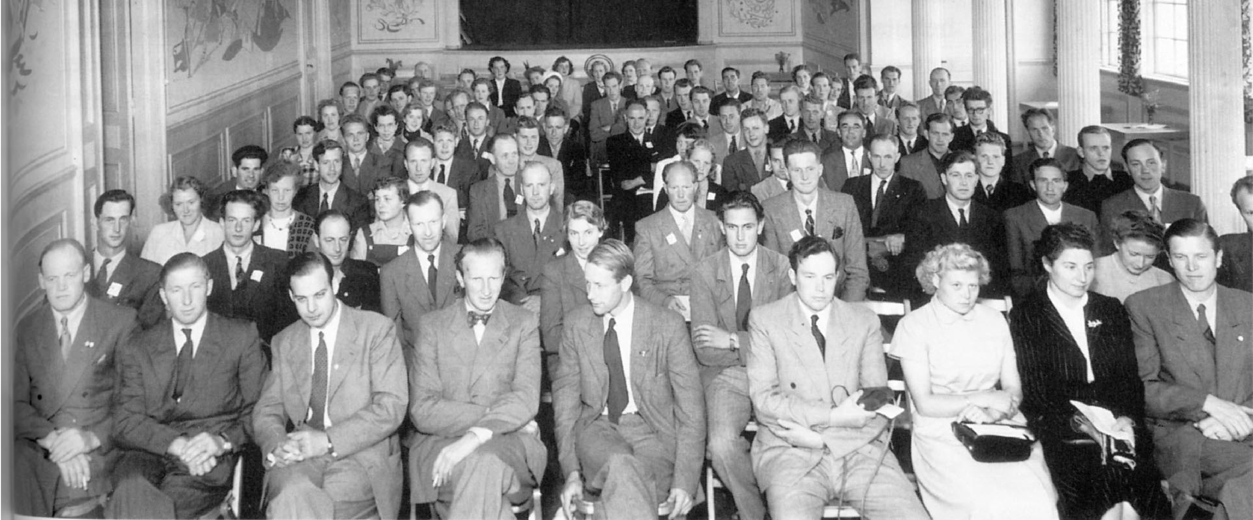 Landsmøtet i Bygdefolkets Ungdomsfylking (Senterungdommen) på Eidsvoll i 1951.